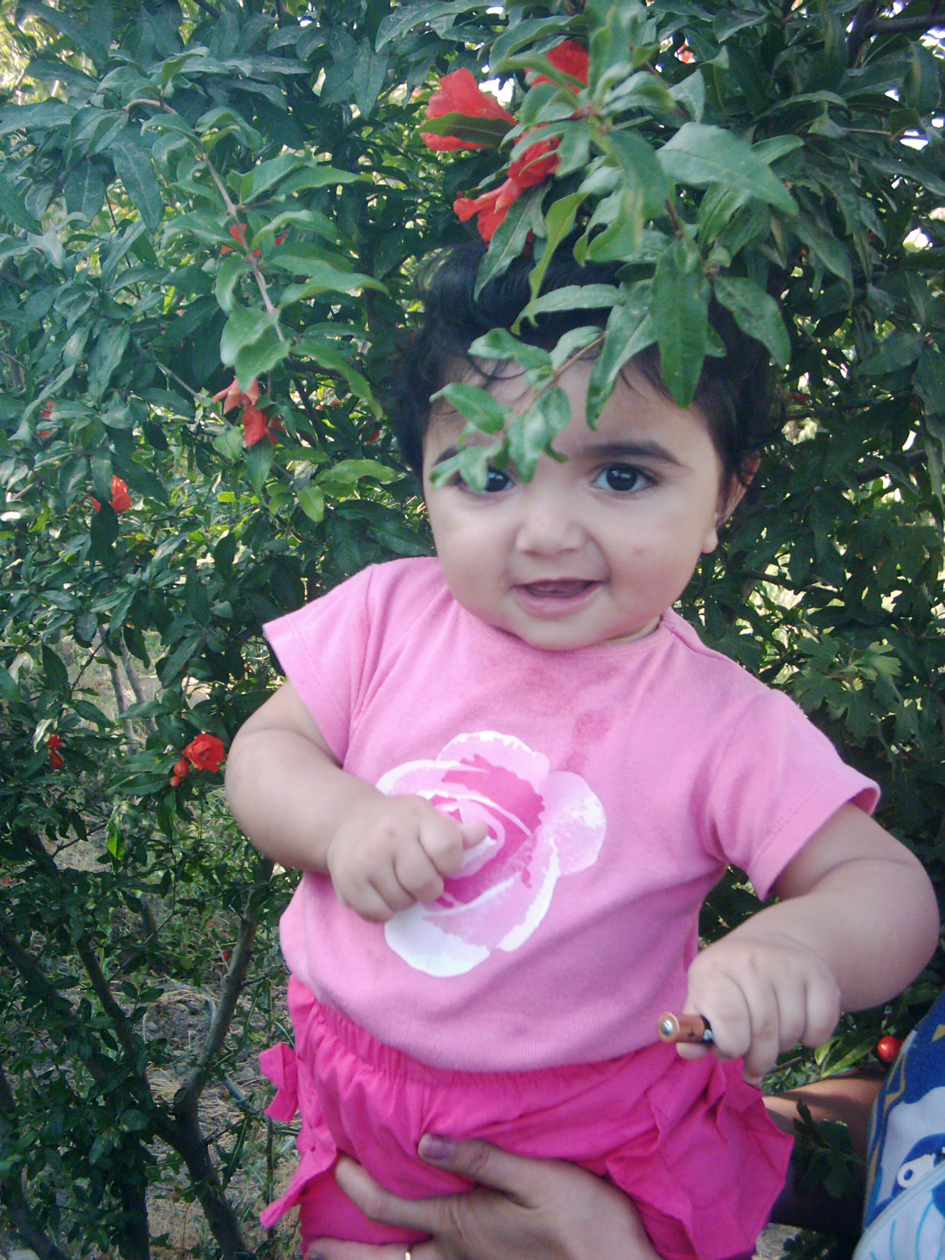 11 oktyabr